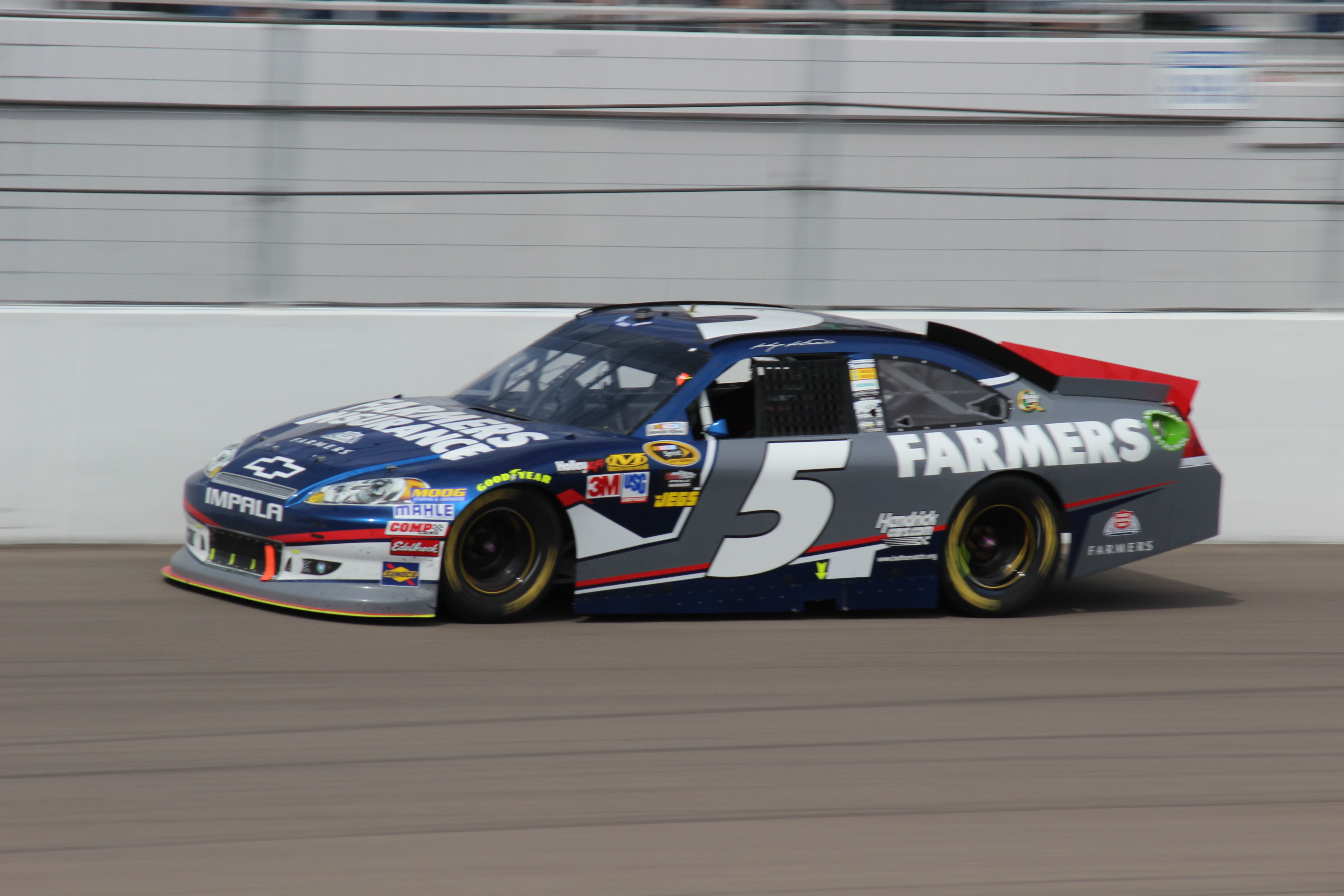 Kasey Kahne - 2012 Kobalt Tools 400 in Las Vegas